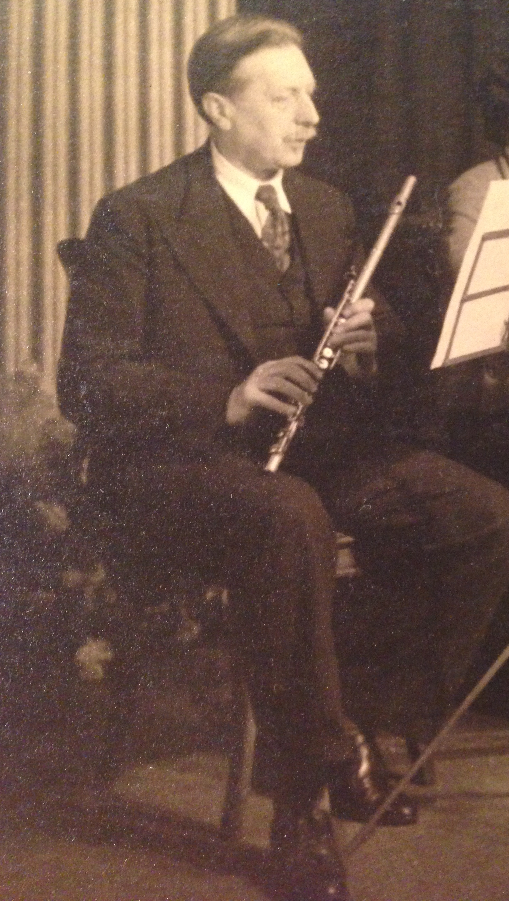 Gaston Blanquart est un flûtiste et pédagogue français, né le 2 juin 1877 et mort à le 1er décembre 1962